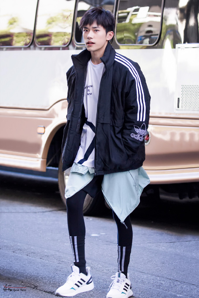 易烊千玺运动Adidas